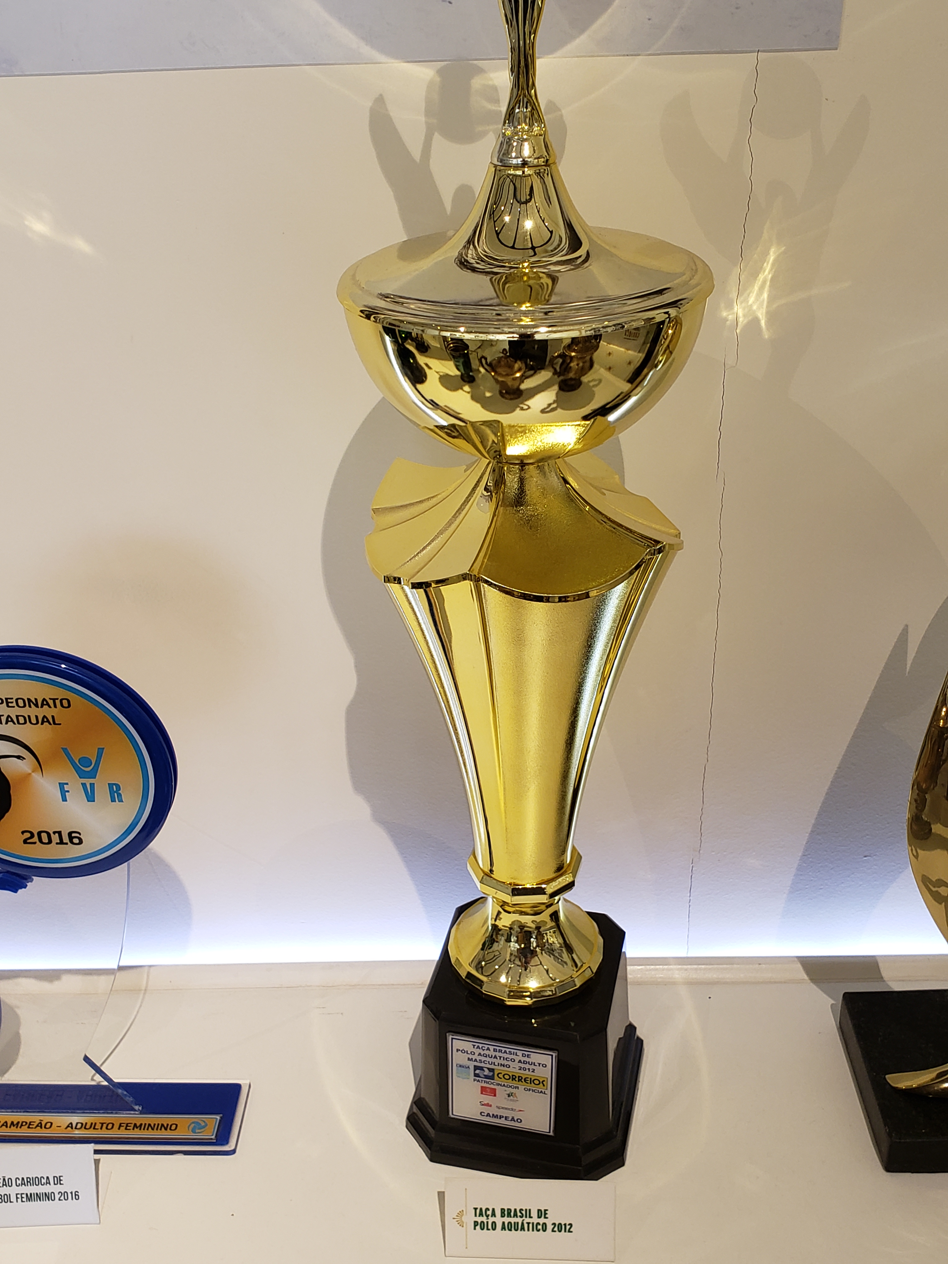 Taça Brasil de Pólo Aquático 2012, conquistada pelo Fluminense Football Club.